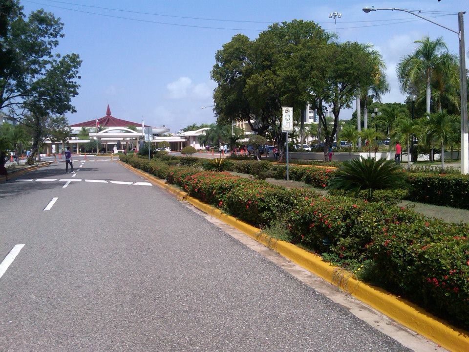 Aula Magna de la Universidad Autónoma de Santo Domingo